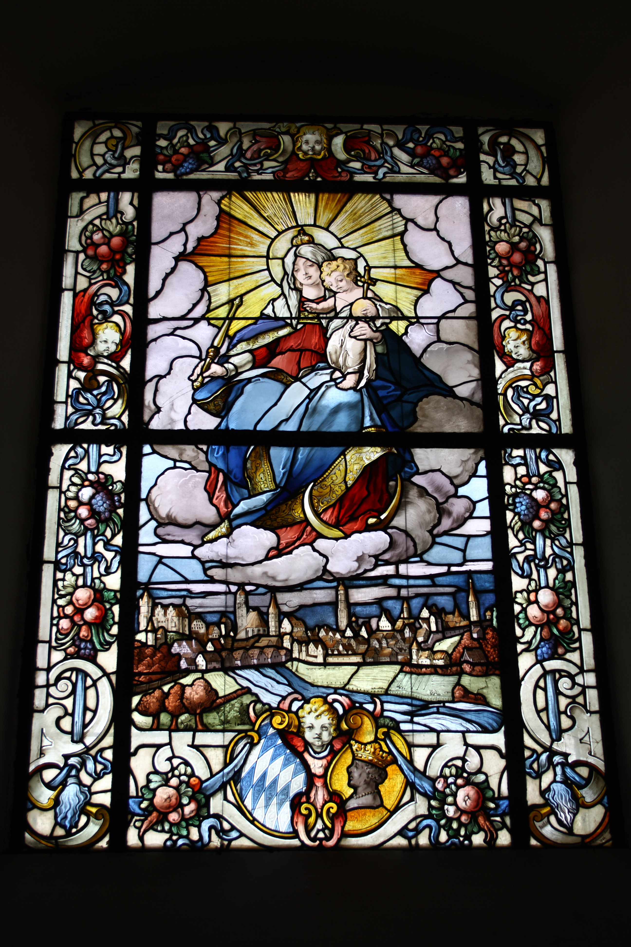 Rathaus von Lauingen, einer Stadt im Landkreis Dillingen an der Donau (Bayern), Bleiglasfenster im Treppenaufgang